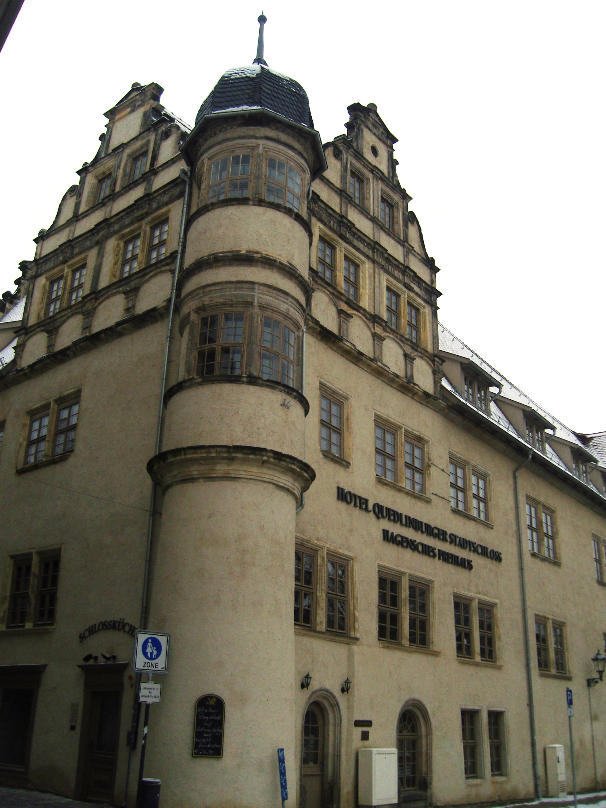 Denkmalgeschütztes Quedlinburger Stadtschloss in Bockstraße 6, Klink 1. Hier noch mit Schriftzug des alten Hotelsbetreibers, der bis Ende Februar 2013 zu sehen war.